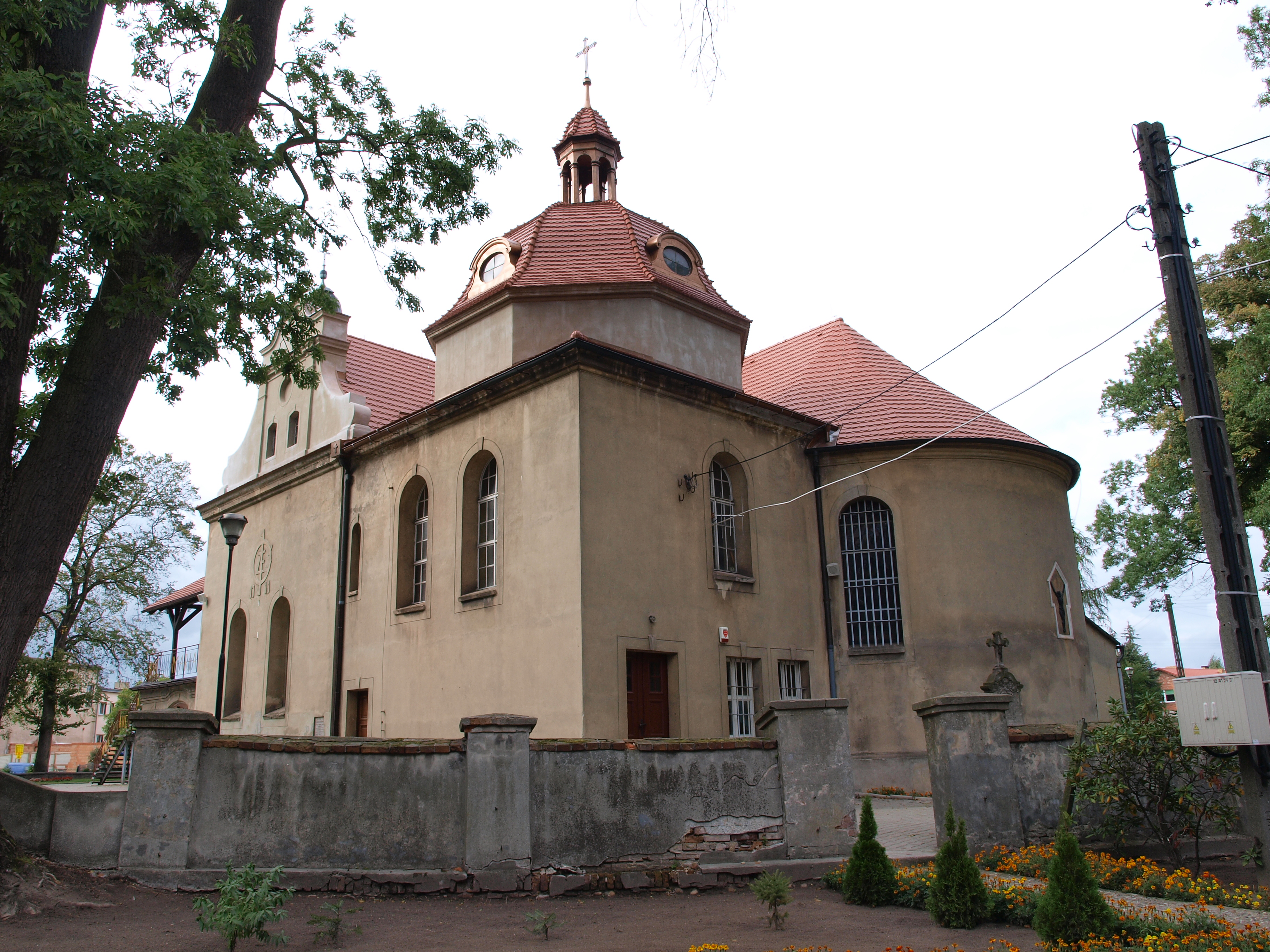 Kaplica przy kościele św.Katarzyny w Skalmierzycach. Widok od strony plebanii IV-73/69/73.